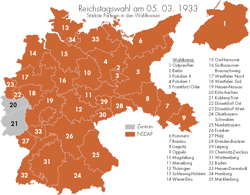 Ergebnisse der Reichstagswahl 1933 auf Wahlkreisebene. Datenquelle